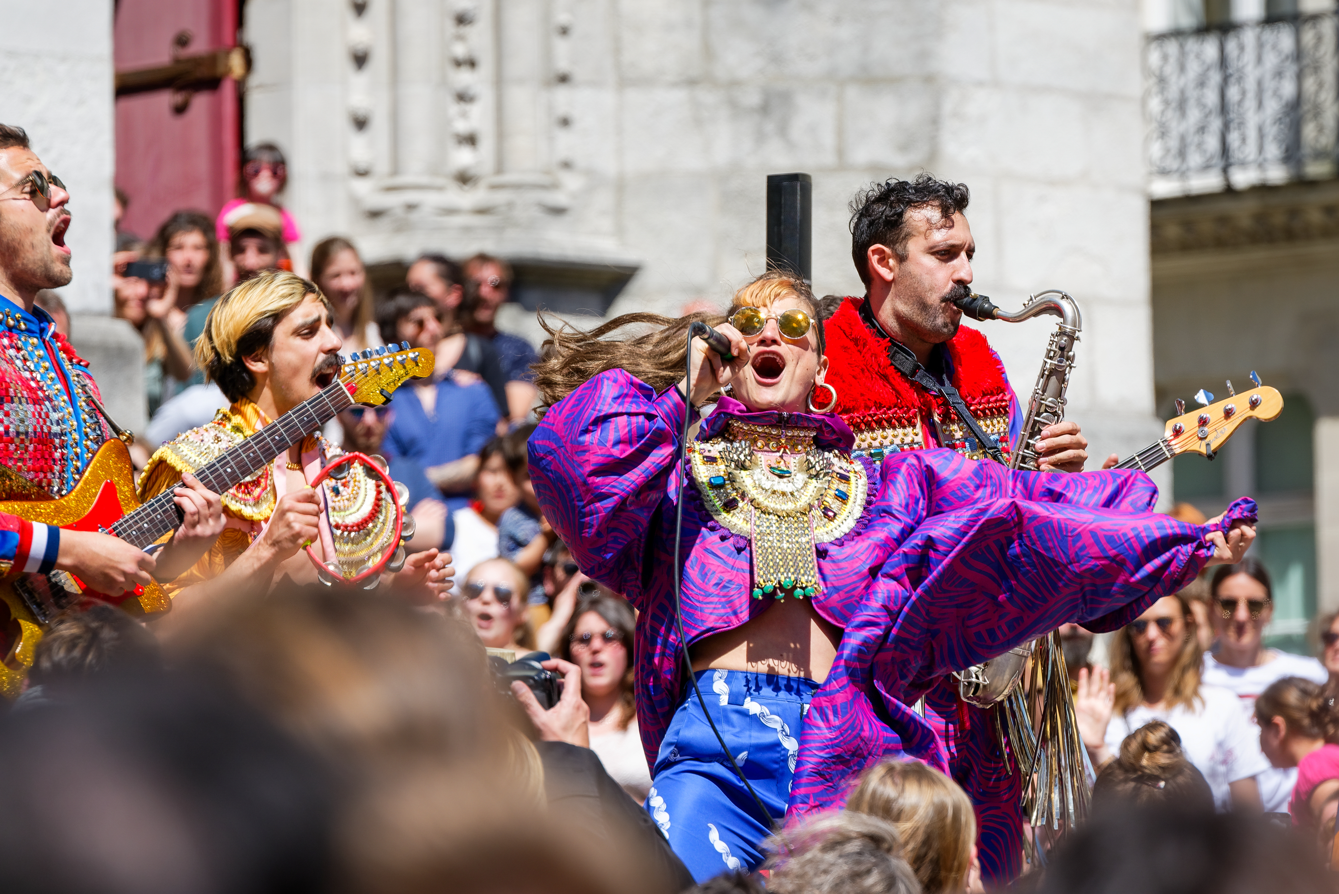 Deluxe en concert "Acoustik Moustache Tour" pour la promotion de leur album "Boys & Girl". (Nantes, Loire-Atlantique, Pays de la Loire, France)